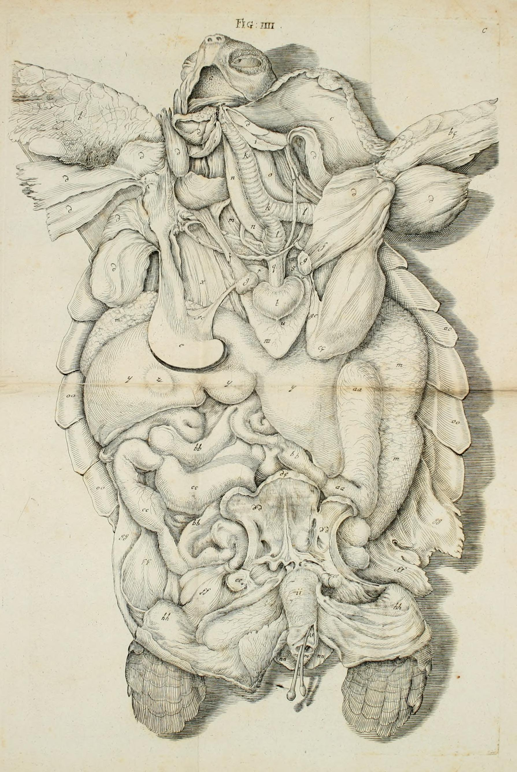 Physikalisch-anatomische Bemerkungen über die Schildkröten : aus dem Lateinischen übersezt. Mit 10 Kupfertafelen / Christoph Gottwald.